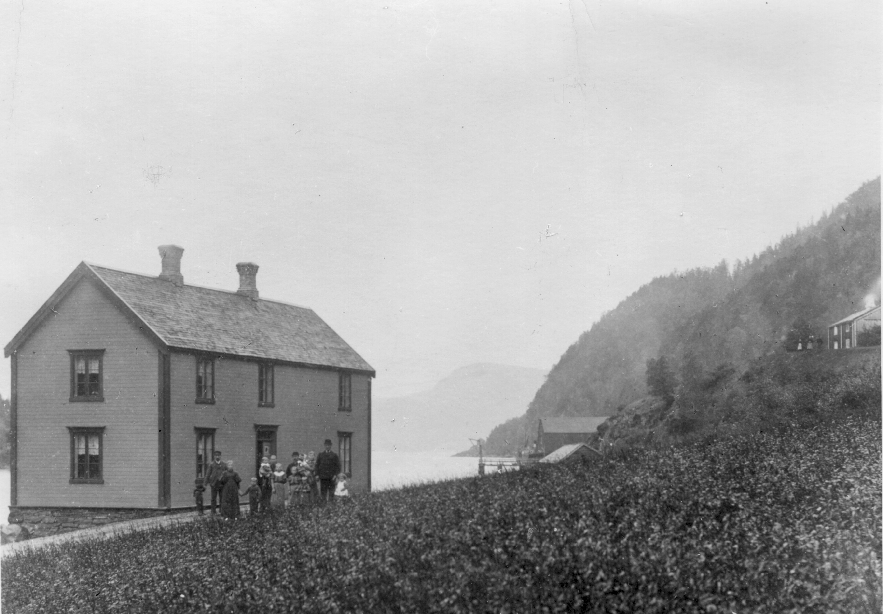 Sjømannshjemmet i Hopla, Åsen, fotografert i 1904. Bygningen var trolig oppført rundt 1890, og var bolig for skipper og mannskap på dampskipet "Nydalen". Huset lå ved vegen til Hopla kai, og ble trolig revet på første halvdel av 1920-tallet. Hopla kai skimtes i bakgrunnen. Oppe til høyre er bolighuset i Tomasplassen, en husmannsplass under Hopla, fraflyttet ca. 1905. Blant personene foran Sjømannshjemmet er trolig Ole og Marie Sundahl med familie. De bodde der fram til de ca. 1905 flyttet til Tinbua ved Lo. Se også Bygdebok for Åsen bind 4, s. 188-189. Fotograf / Photographer: Ukjent Fotoeier / Photo owner: Kåre Vordal Digitalisering / Digitizing: Arne Langås Foto-ID / Photo ID: 036-0070 Har du utfyllende opplysninger? Legg gjerne igjen en kommentar nedenfor eller send e-post til . | Do you have additional information? Please leave a comment or send an e-mail to .